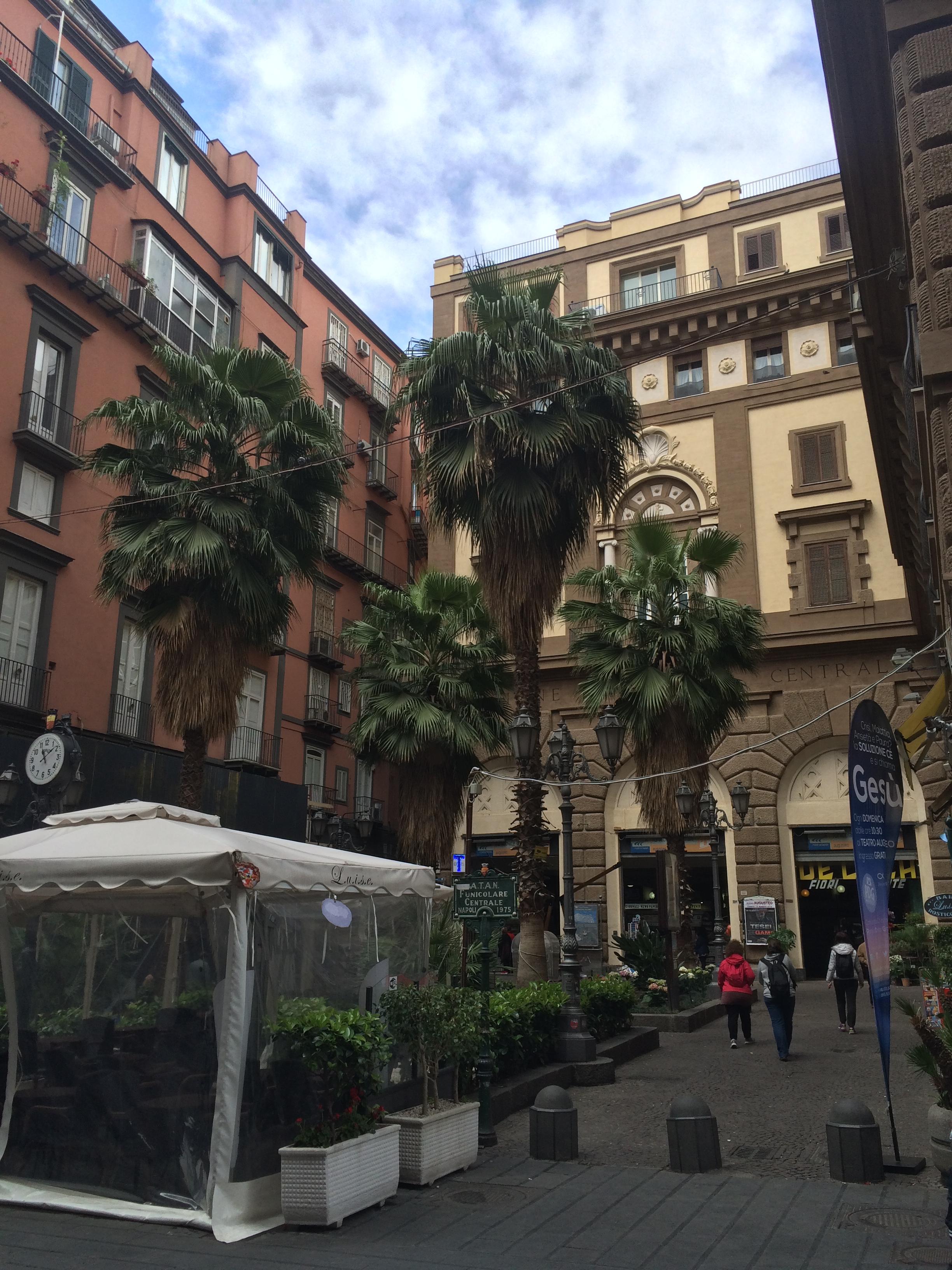 Vista verso la funicolare Centrale. A sinistra, il palazzo Berio.